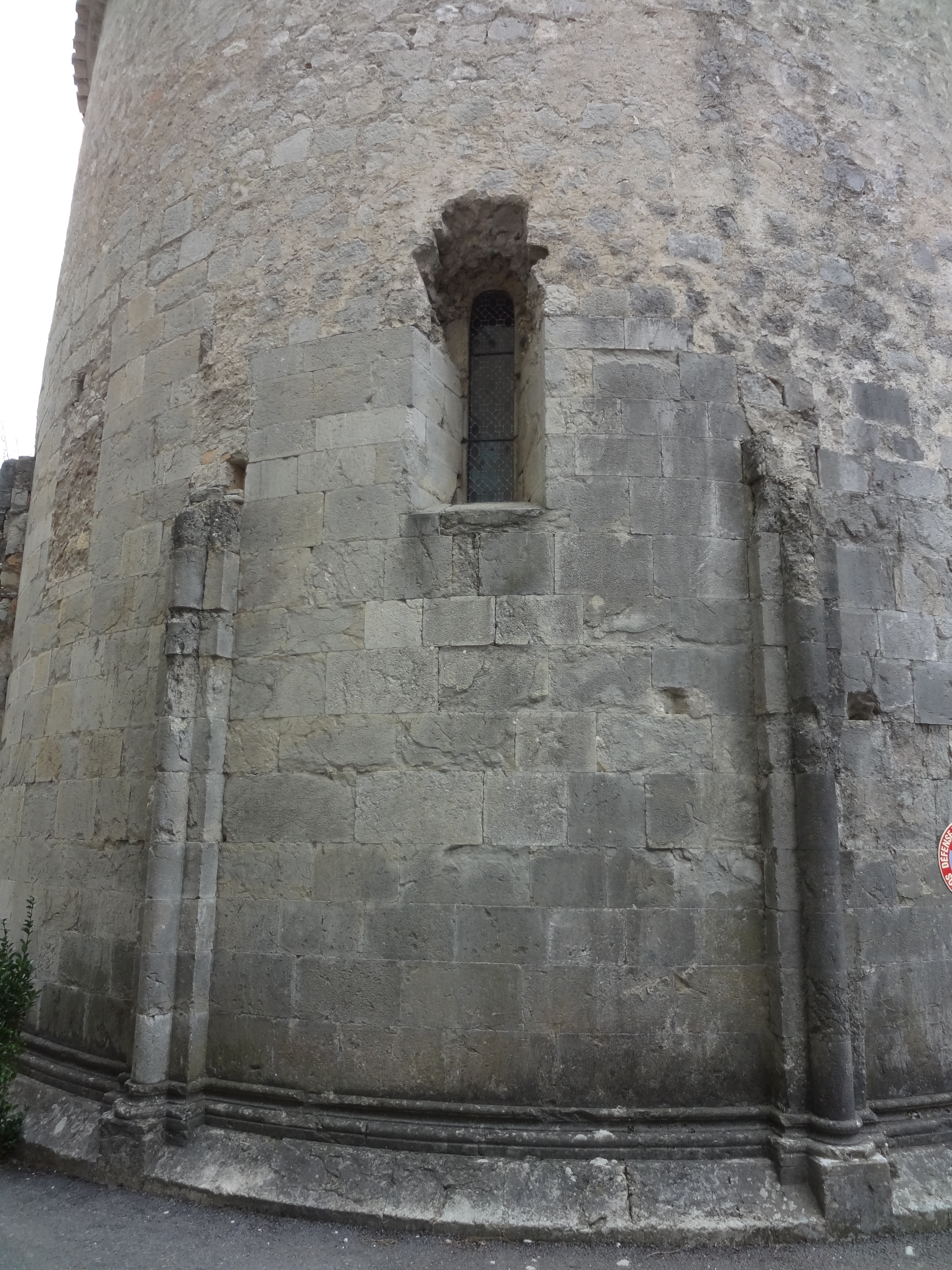 Détail du chevet de l’ancienne cathédrale Notre-Dame-de-la-Seds à Glandèves, à Entrevaux